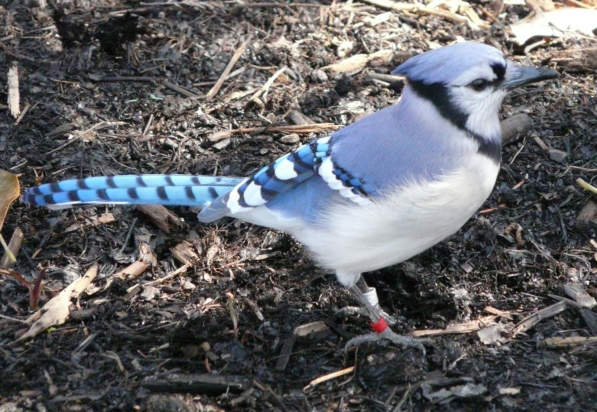 bluejay, Saint Louis Zoo, Missouri / 2008